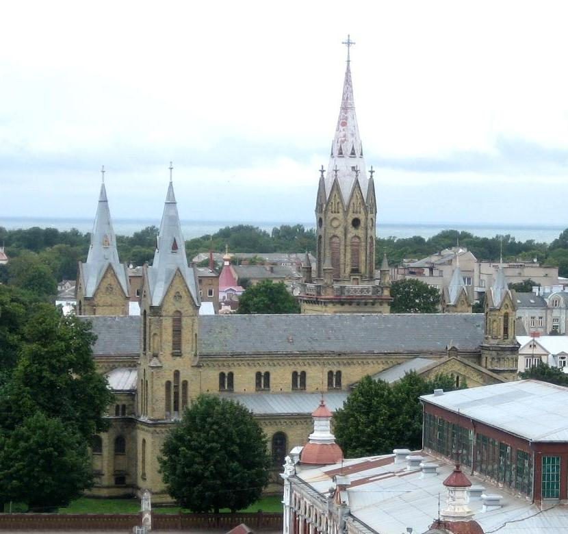 Blick auf den Markt und die katholische St.-Josefs-Kathedrale in Liepaja